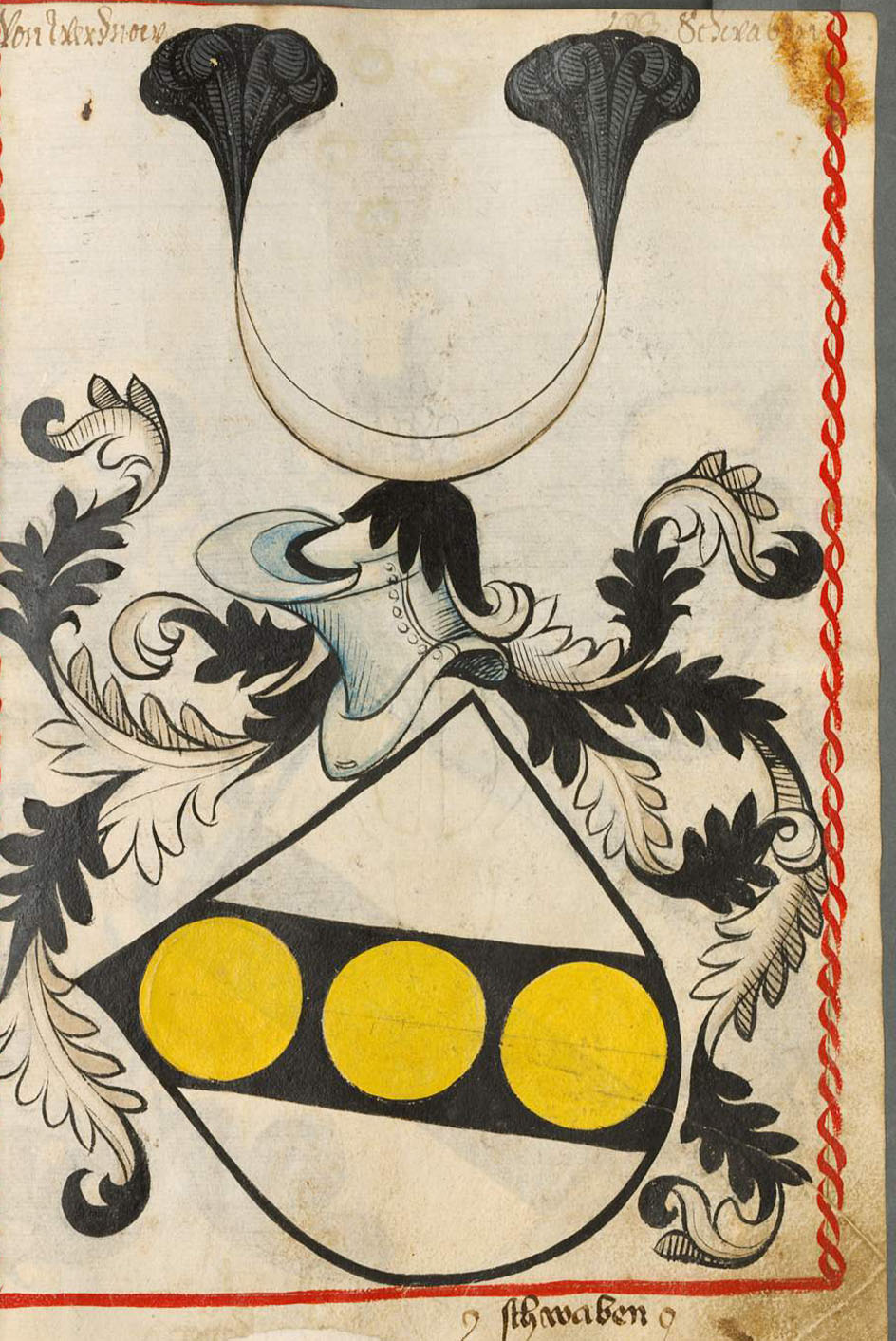 Scheibler'sches Wappenbuch, älterer Teil Wernau